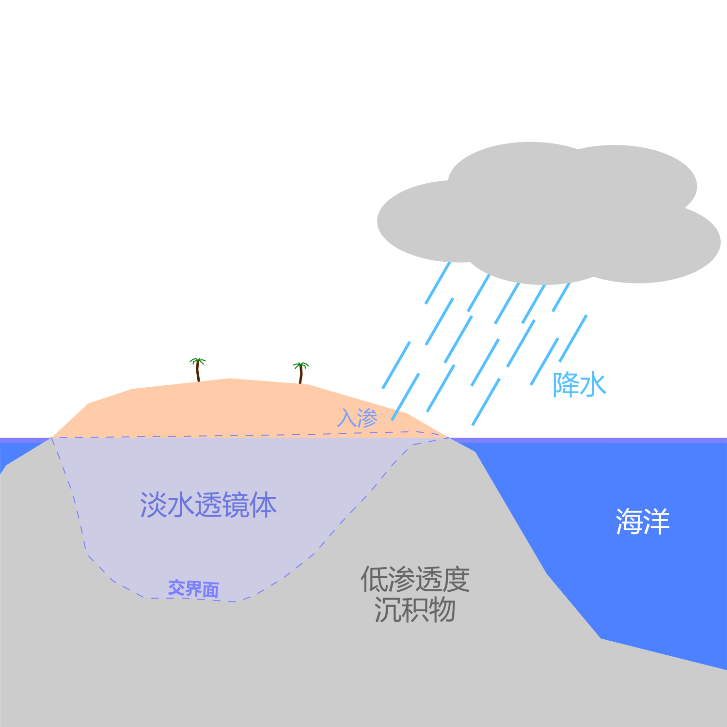 根据盖本-赫兹方程式（Ghyben-Herzberg eq.）推导，理想中地下水（淡水）在岛屿地下形成的透镜体构造。